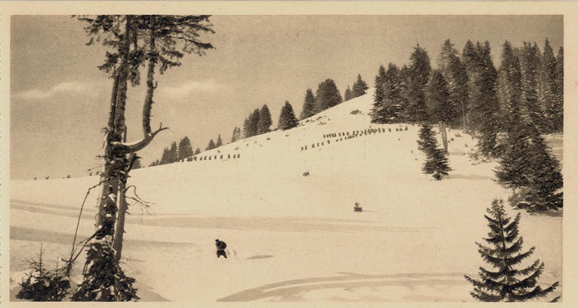 Српска војска прелази Чакор, фотографија Самсона Чернова објављена у албуму „Петогодишњи рат – Срби 1912-1916“ у Лондону 1916. године.